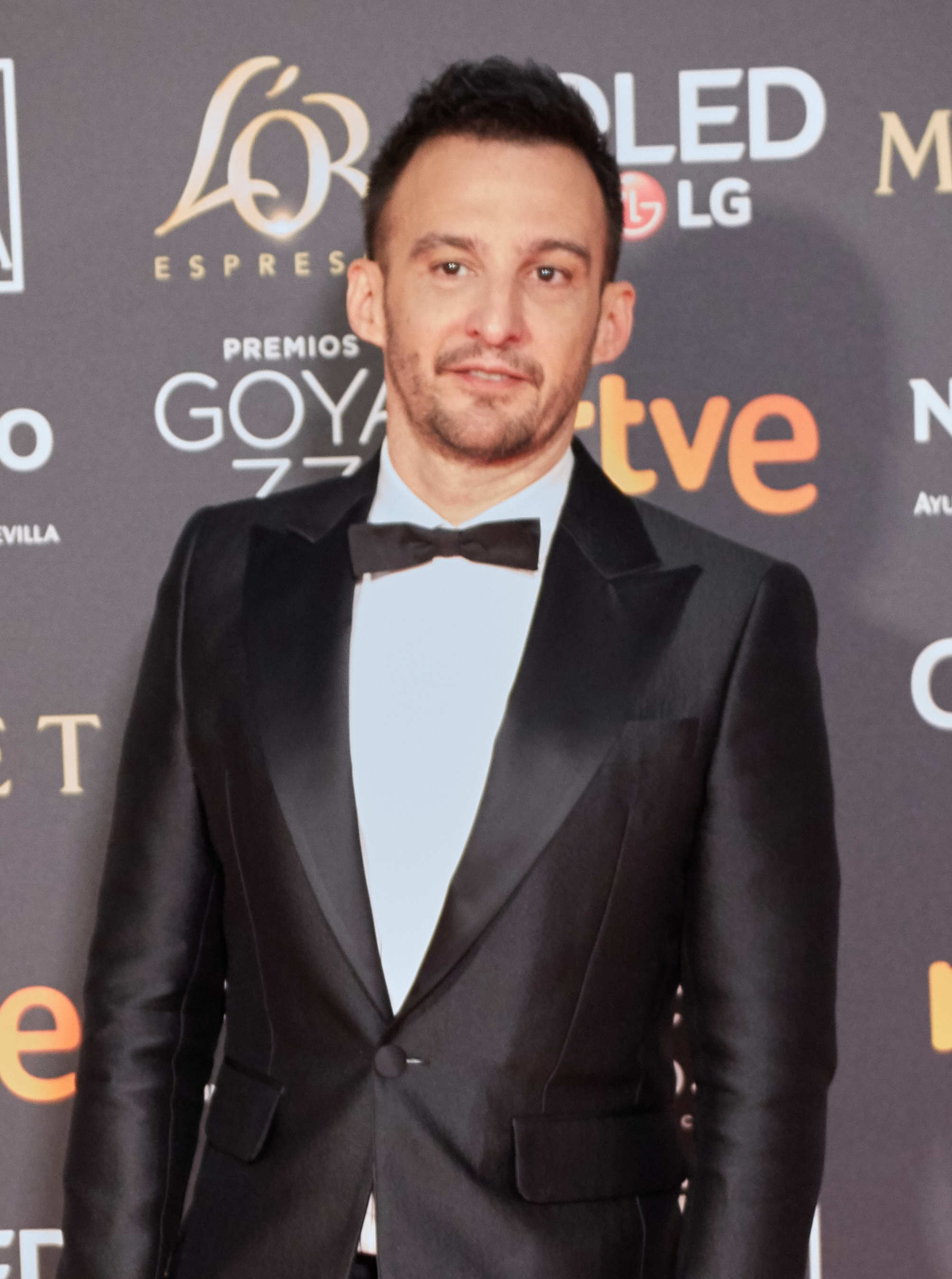 Alejandor Amenabar en la alfombra roja de los Premios Goya celebrados en Sevilla en Febrero 2019